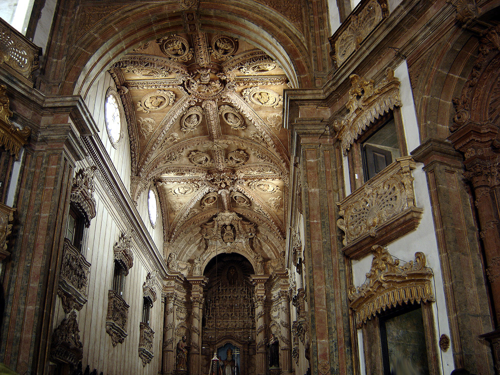 Interior da Concatedral de São Pedro dos Clérigos, Recife, Pernambuco, Brasil. Detalhe da capela-mor